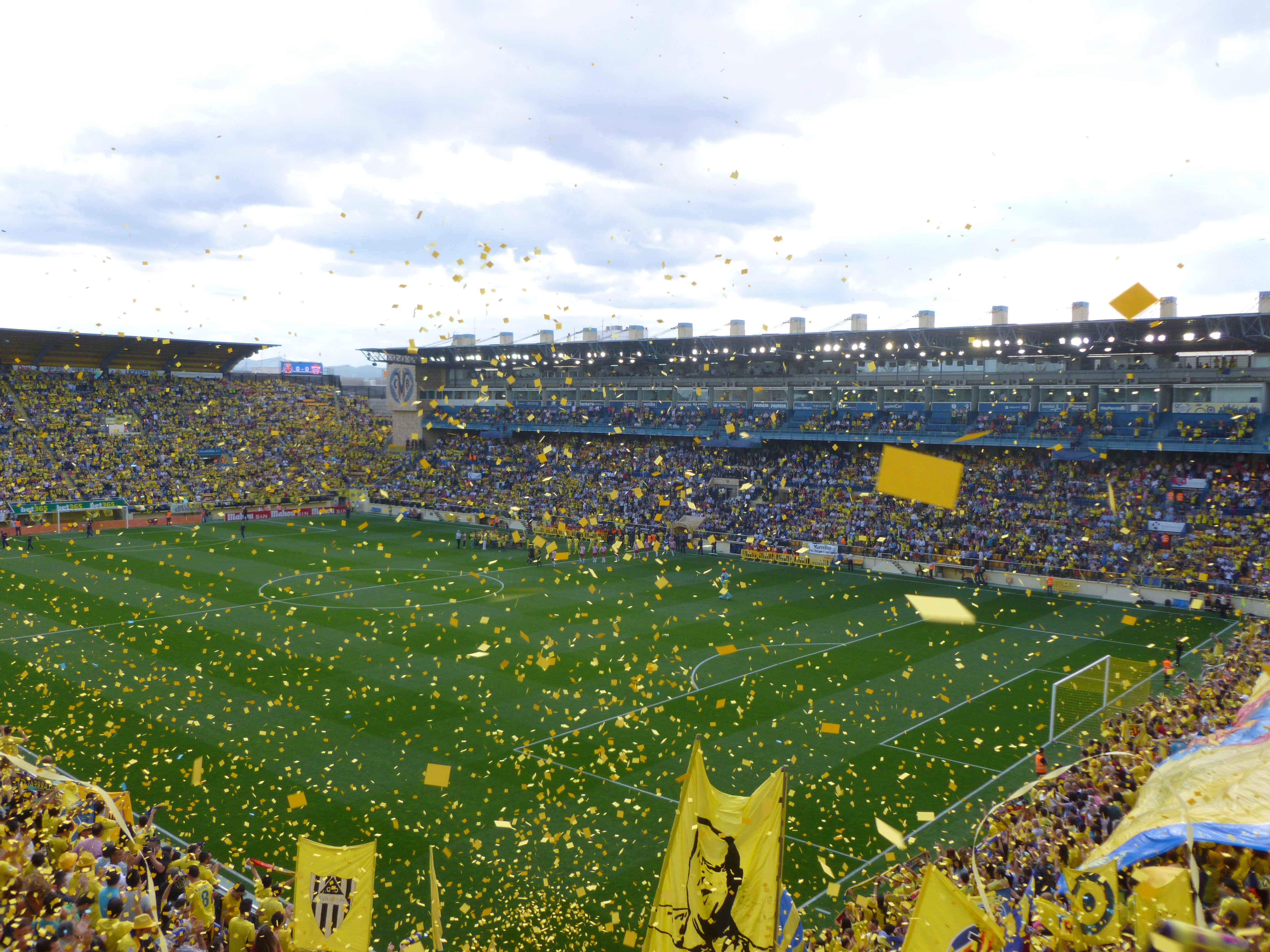 Entrada dels jugador al camp a l'inici del Vila-real - Almeria de la 42a jornada de la Segona Divisió d'Espanya, la temporada 2012-13. El partir es va disputar a El Madrigal i va acabar 1-0, i va servir per a que el Vila-real pujara a la Primera Divisió